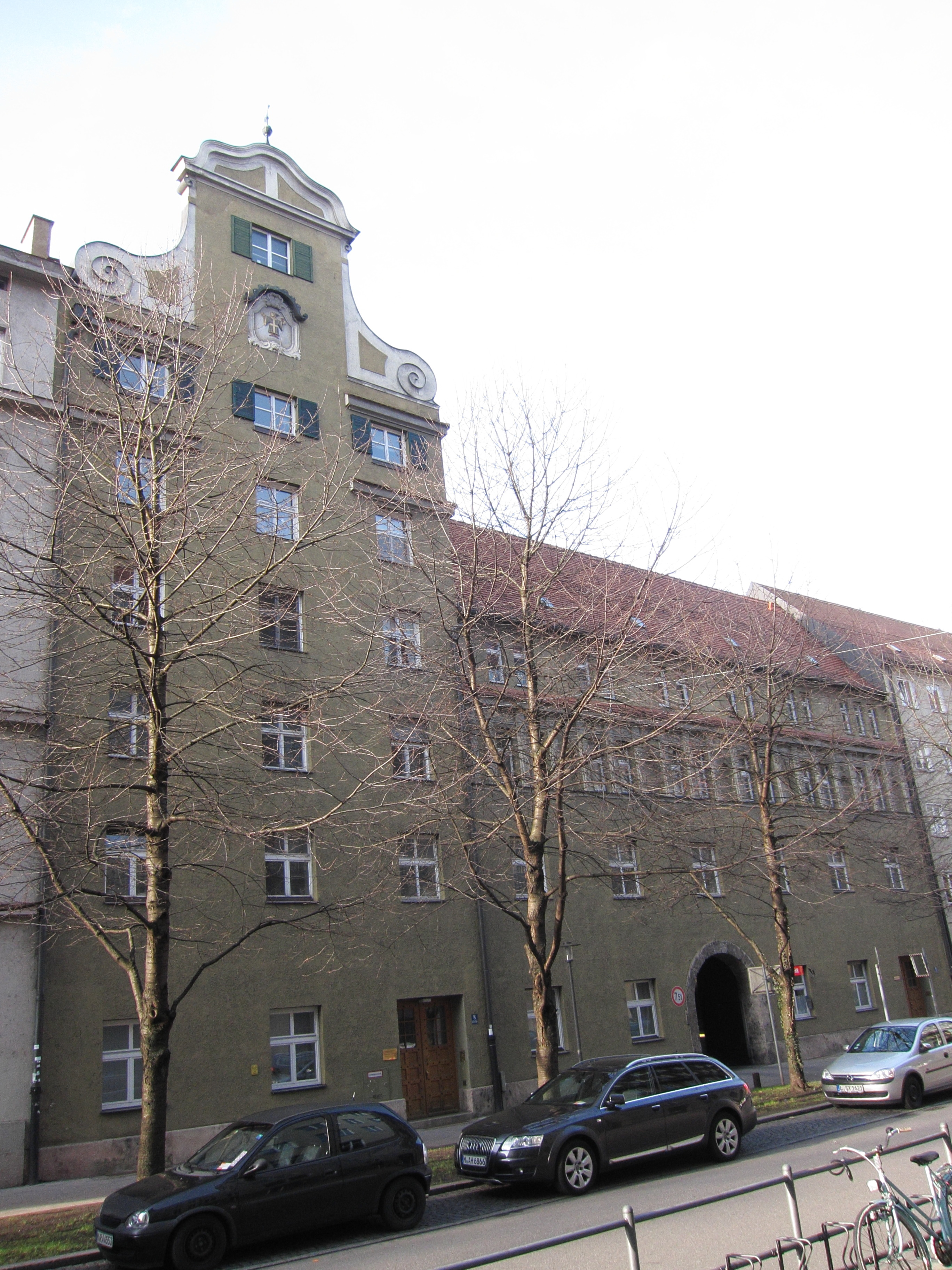 Unterer Anger 8/9; Nebengebäude des Hauptfeuerhauses (siehe An der Hauptfeuerwache 8), historisierender Verwaltungs- und Wohnbau, 1906–1907 von Robert Rehlen.